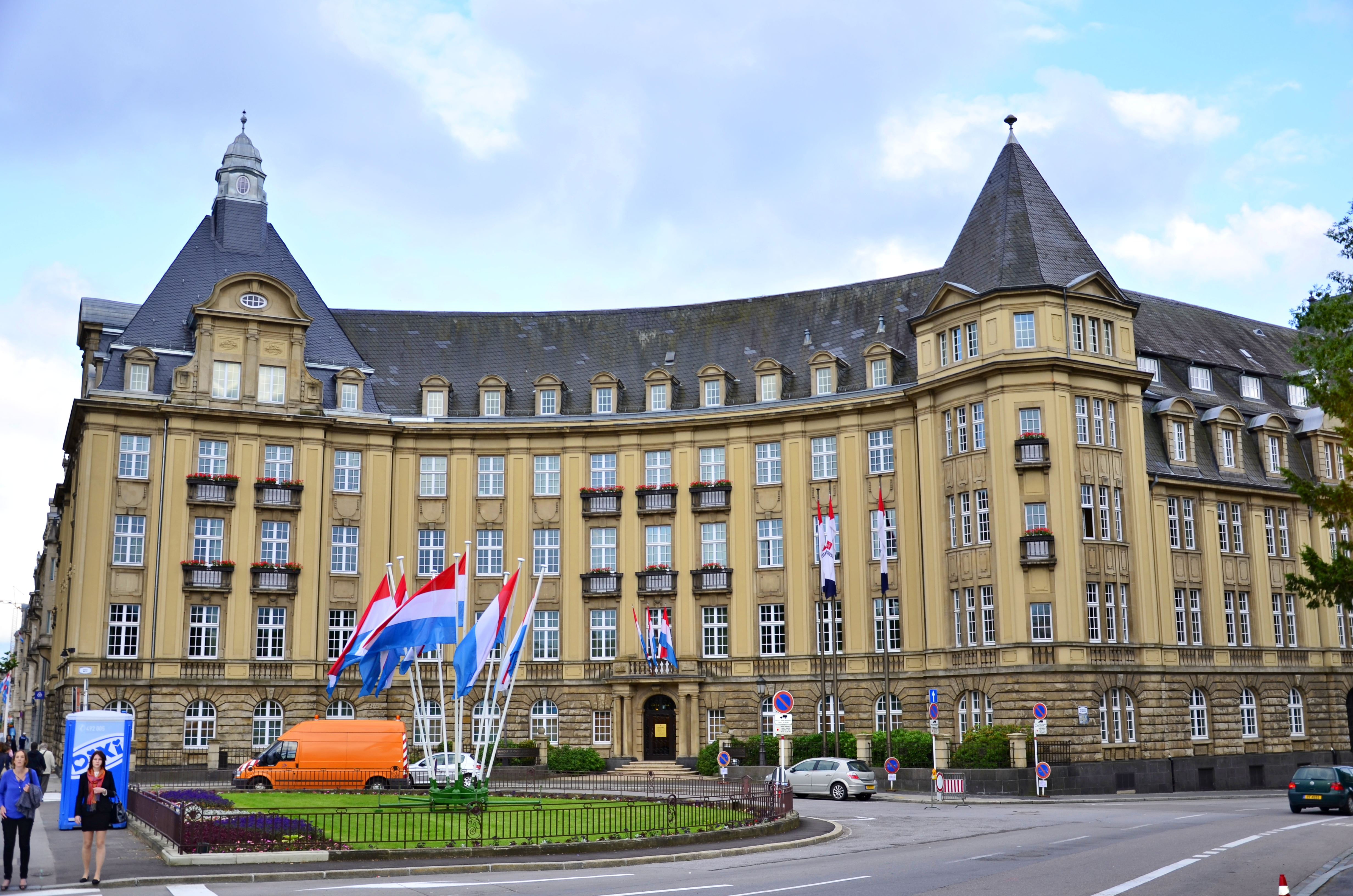 Luxembourg Capital City